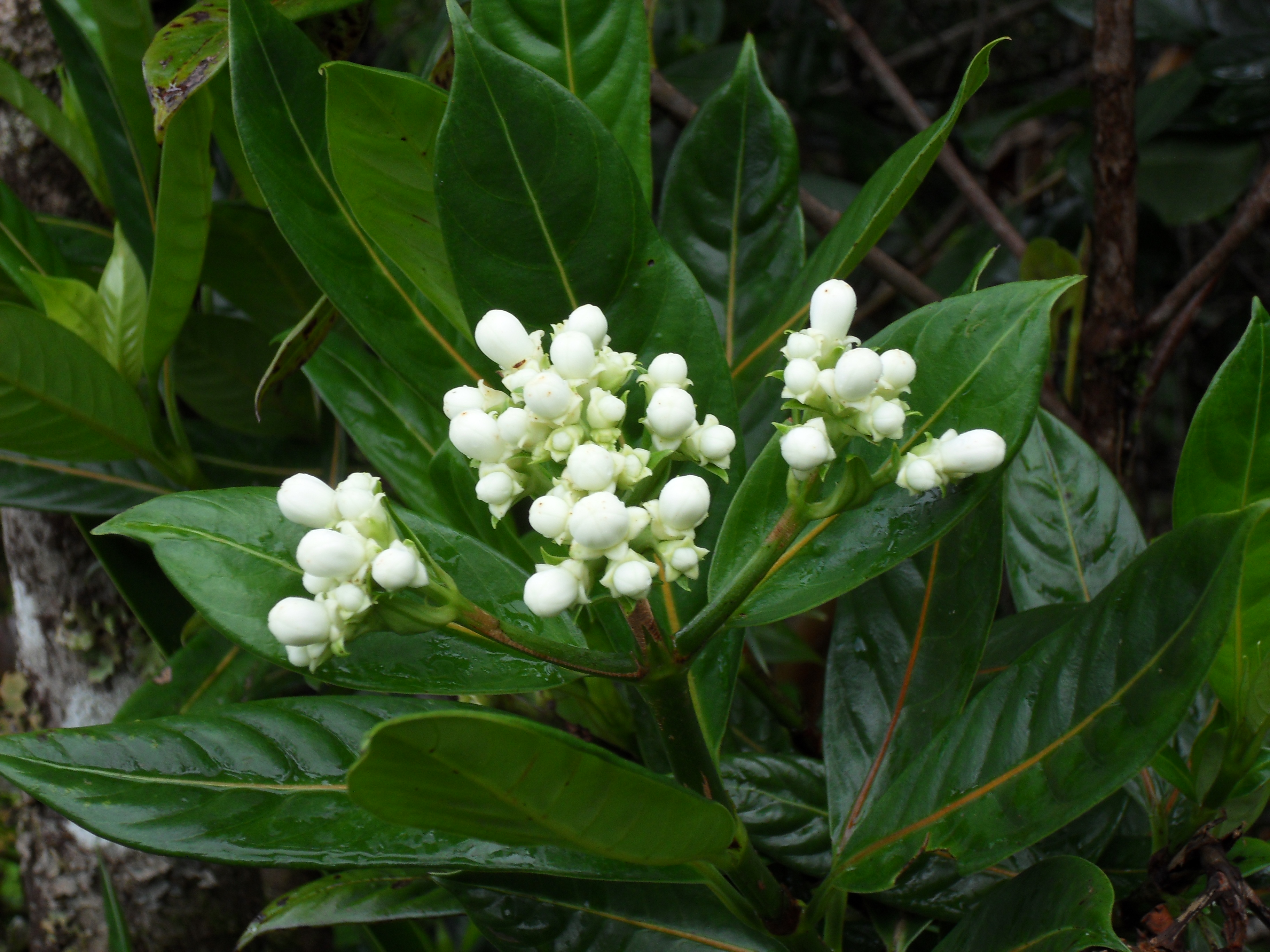 Boutons floraux et feuilles de Losto café, dans les hauts de Bras-Panon (près du Belvédère de l'Eden).